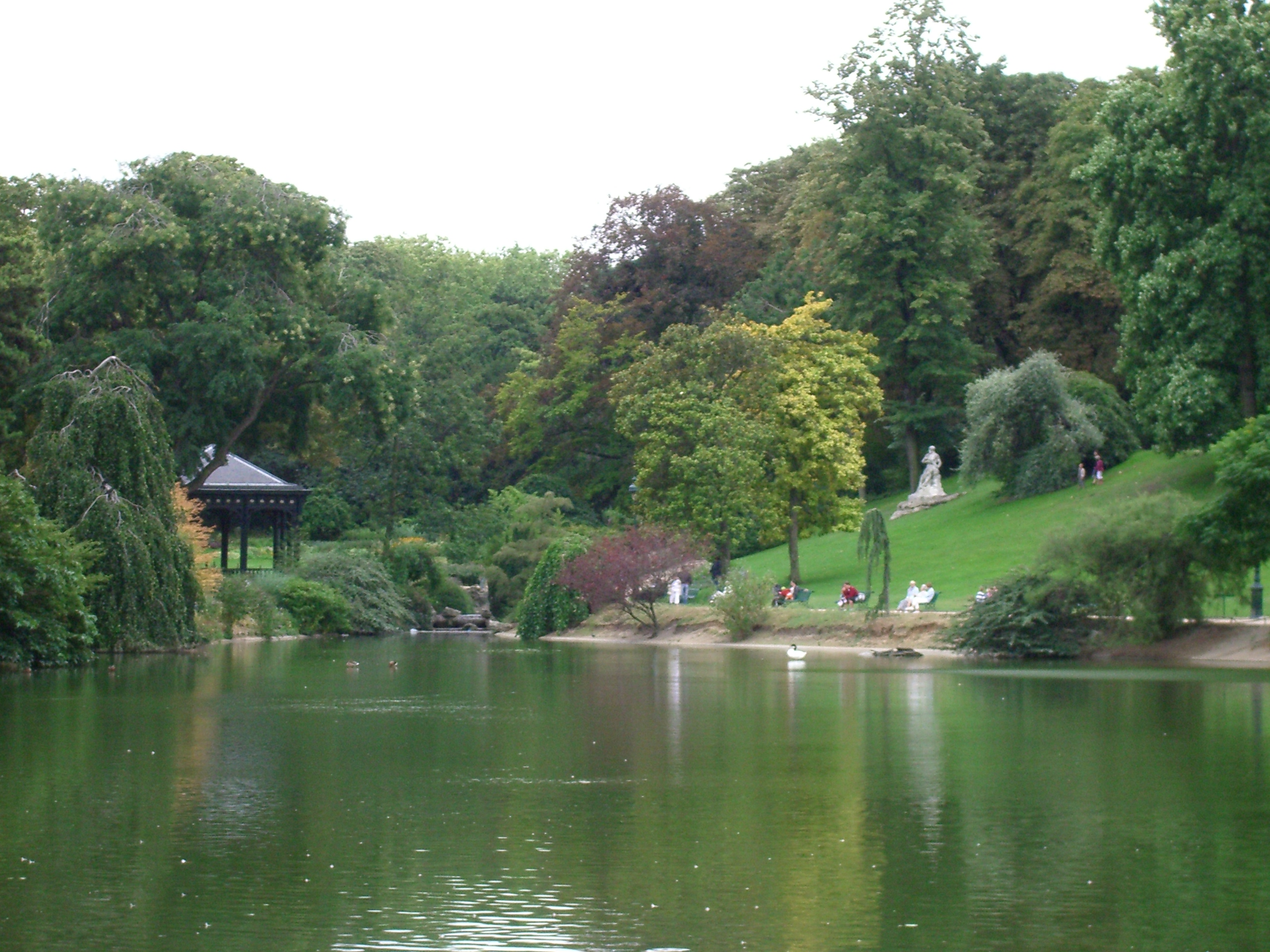 Vue du parc Montsouris, à Paris (France)